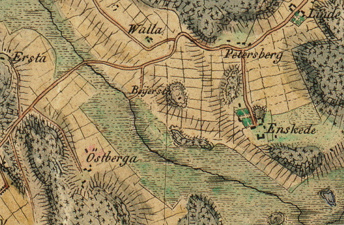 Del av karta över Stockholm visande gårdarna Bägersta, Ersta, Walla, Östberga